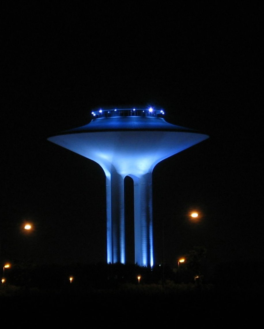 Hyllie water tower in Malmö, Sweden. Night view.